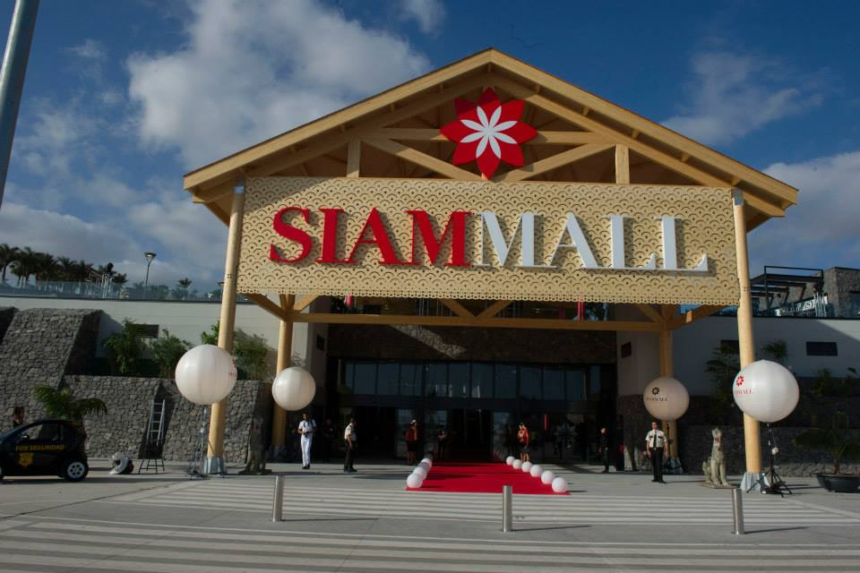 La temática del centro está basada en la ambientación tailandesa, con numerosas figuras y decoraciones diseñadas y ejecutadas en Tailandia especialmente para sus espacios.